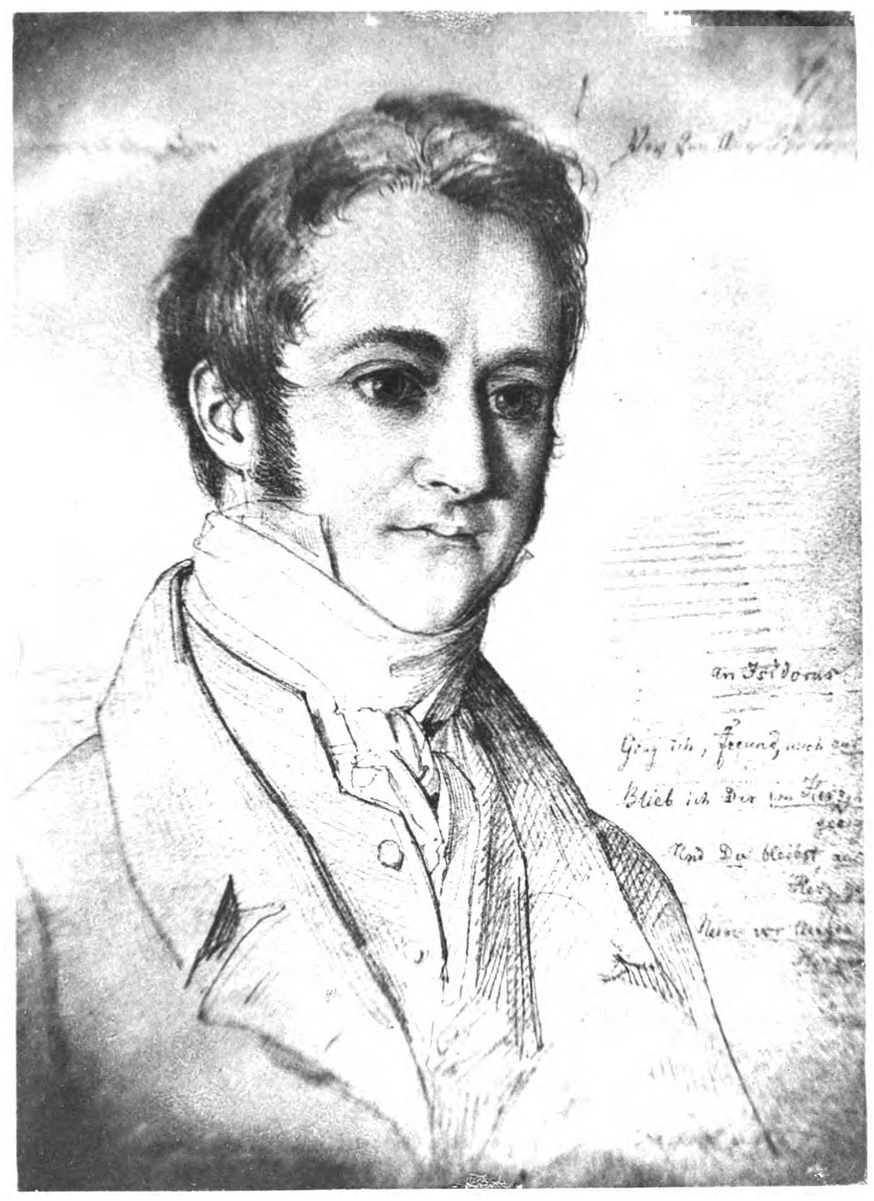 Otto Heinrich Graf von Loeben (Isidorus Orientalis): Sein Leben und seine Werke von Raimund Pissin. B. Behr, 1905